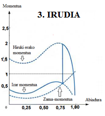 Momentu grafika